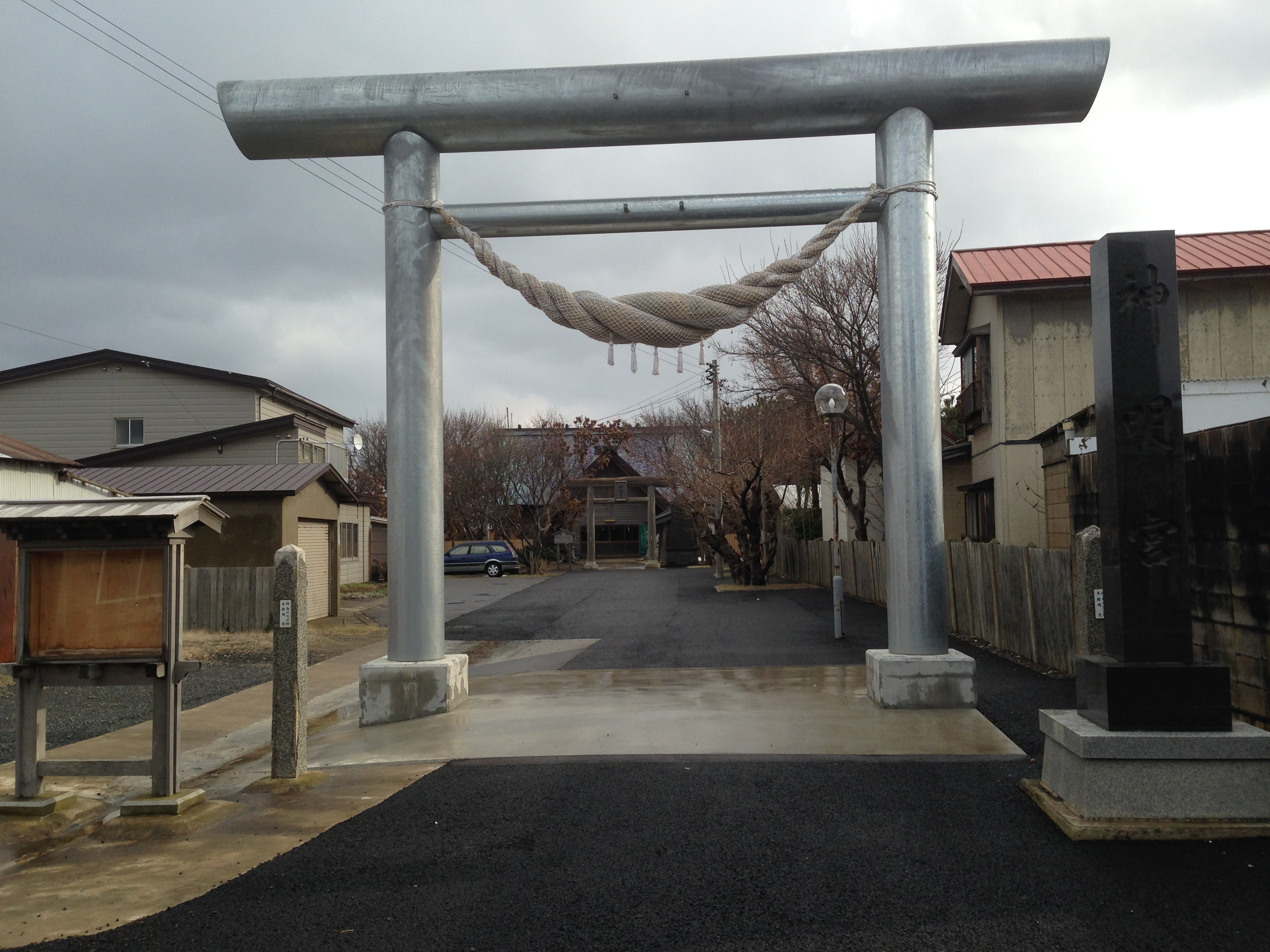 青森県の十三湖西部（十三地区）にある神明宮（一つ目の鳥居）。なお、付近のバス停の停留所名は「十三神社前」。